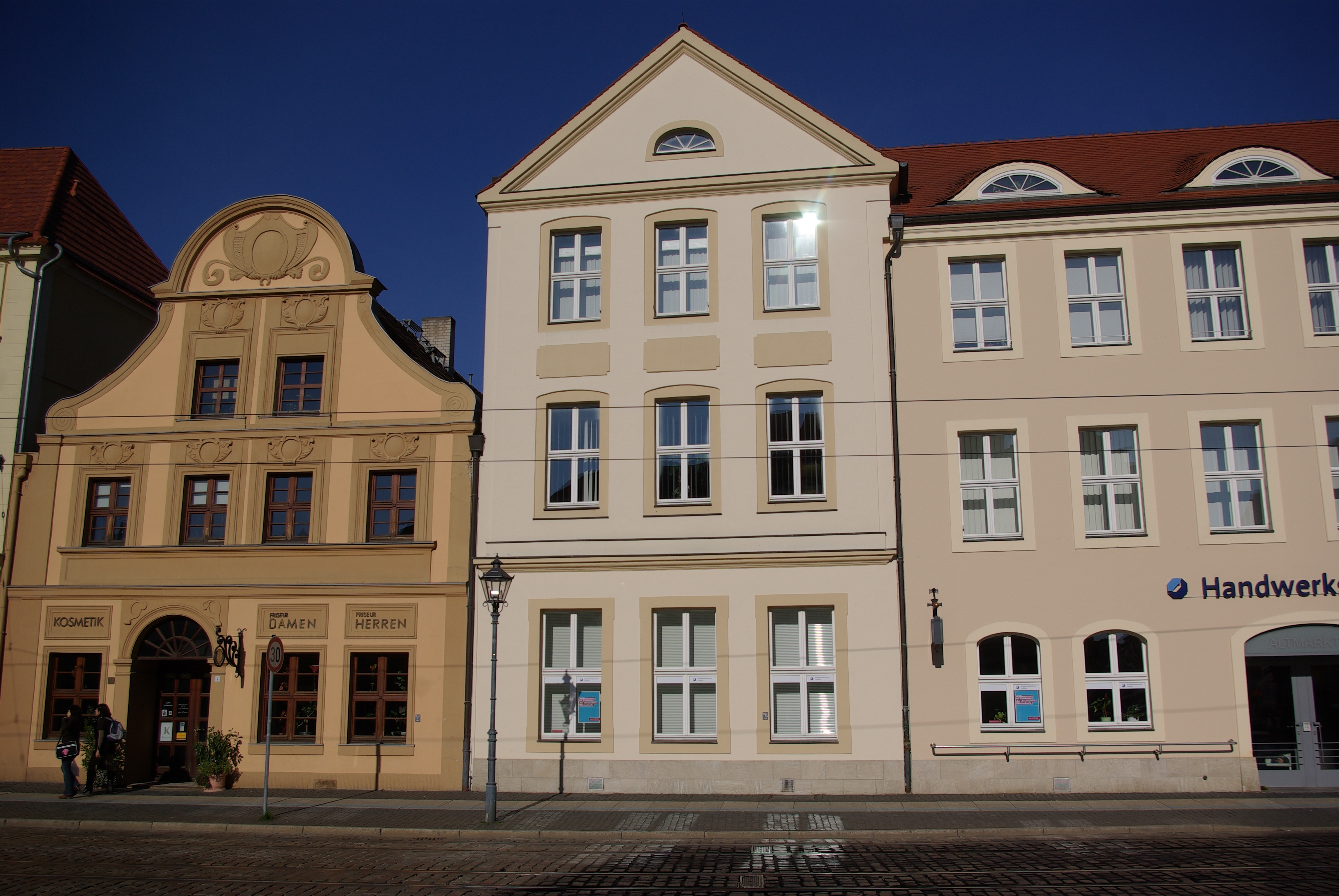 Cottbus in Brandenburg. Das Haus Altmarkt17 steht unter Denkmalschutz.